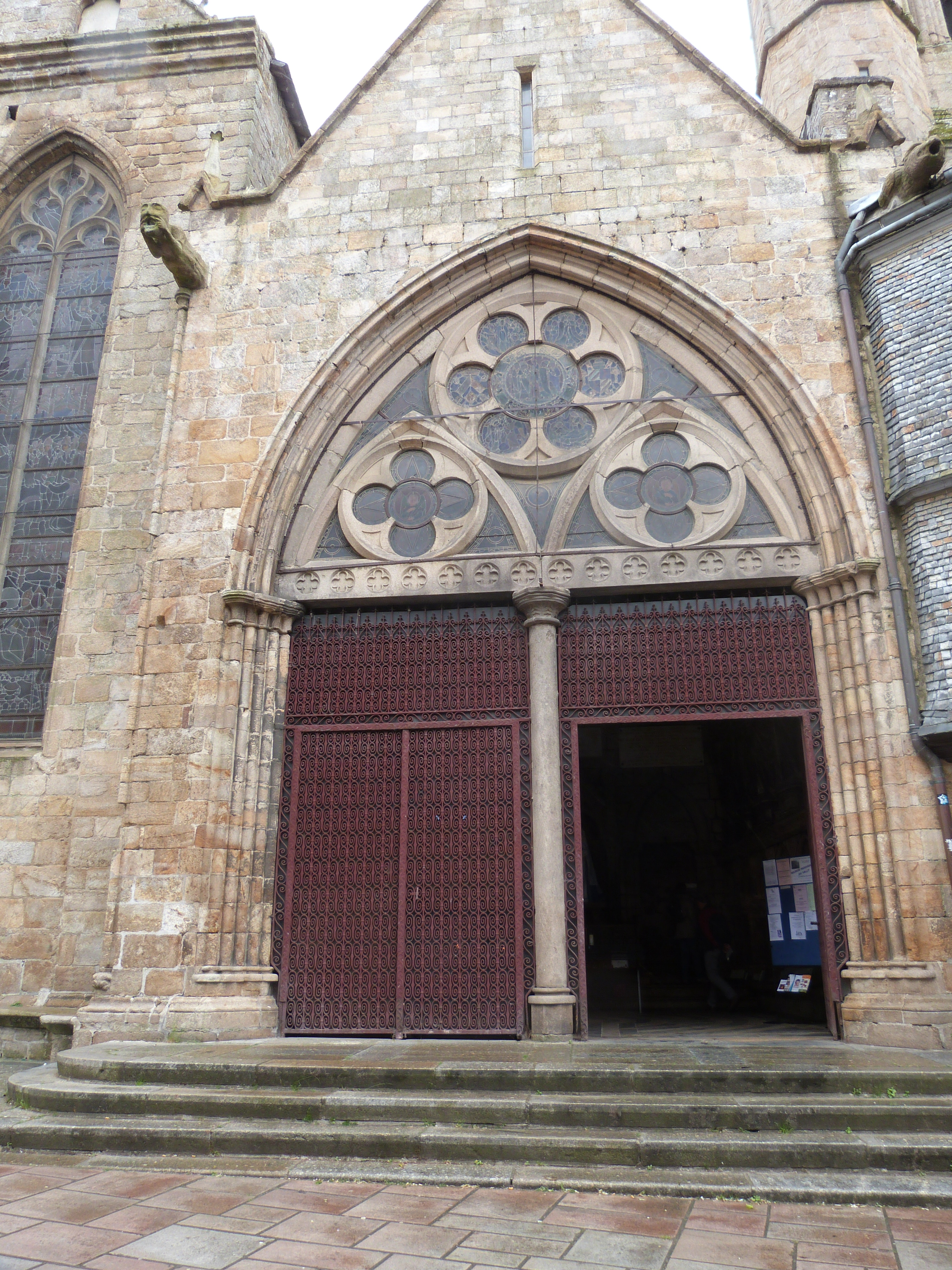 Portail du porche nord de la basilique Notre-Dame de Bon-Secours à Guingamp